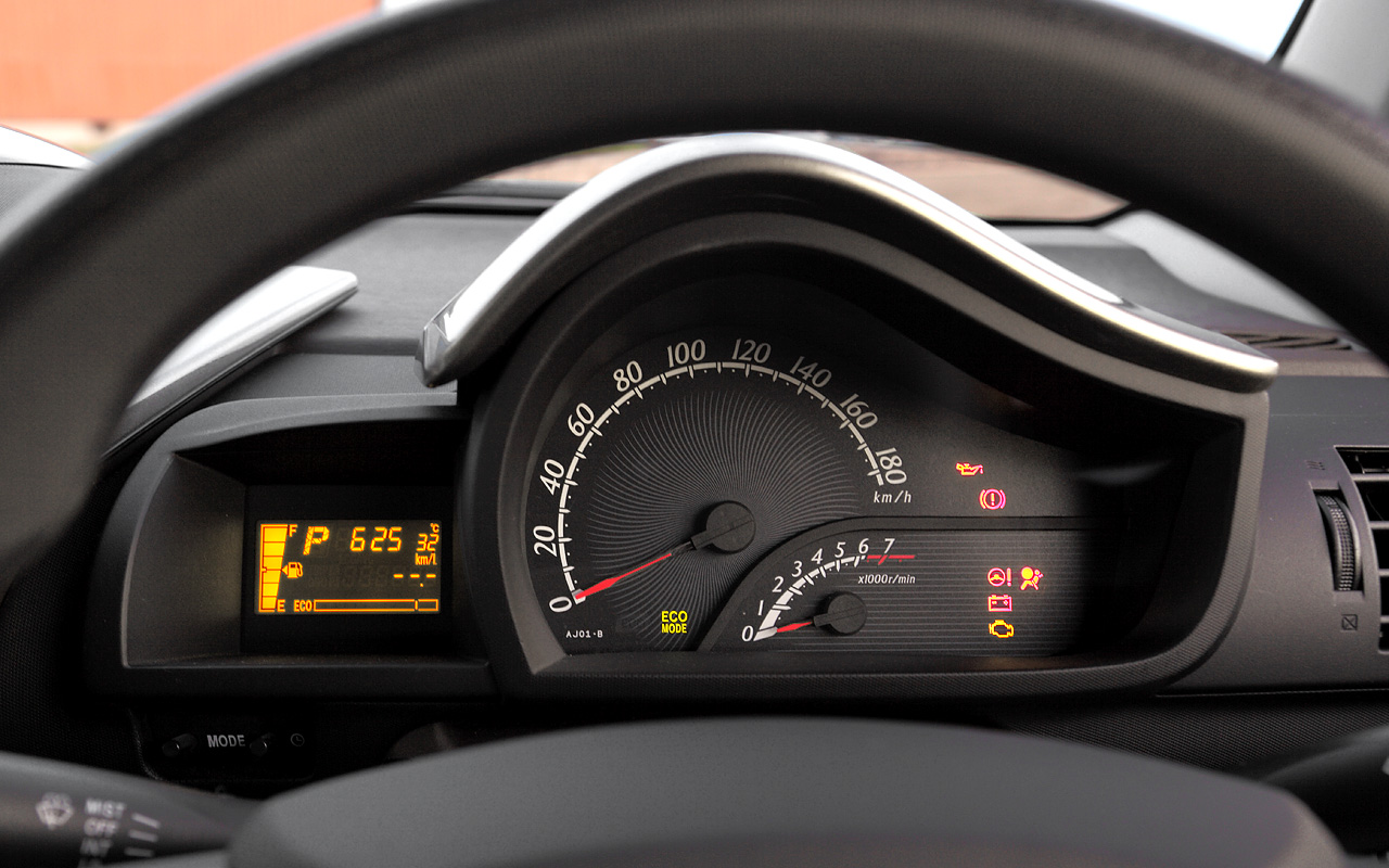 Toyota iQ.